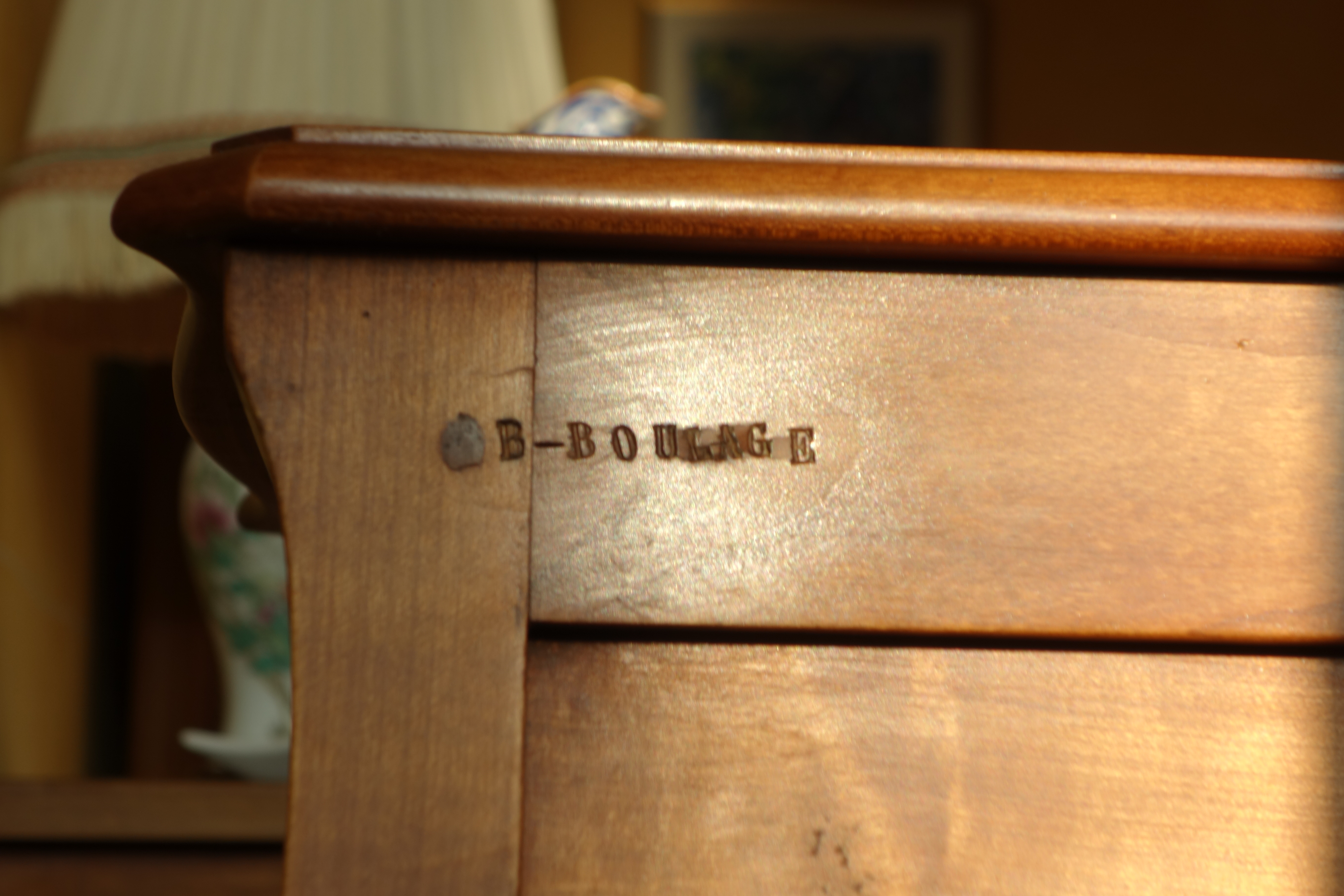 estampille d'un ébéniste : « B - BOULAGE ».